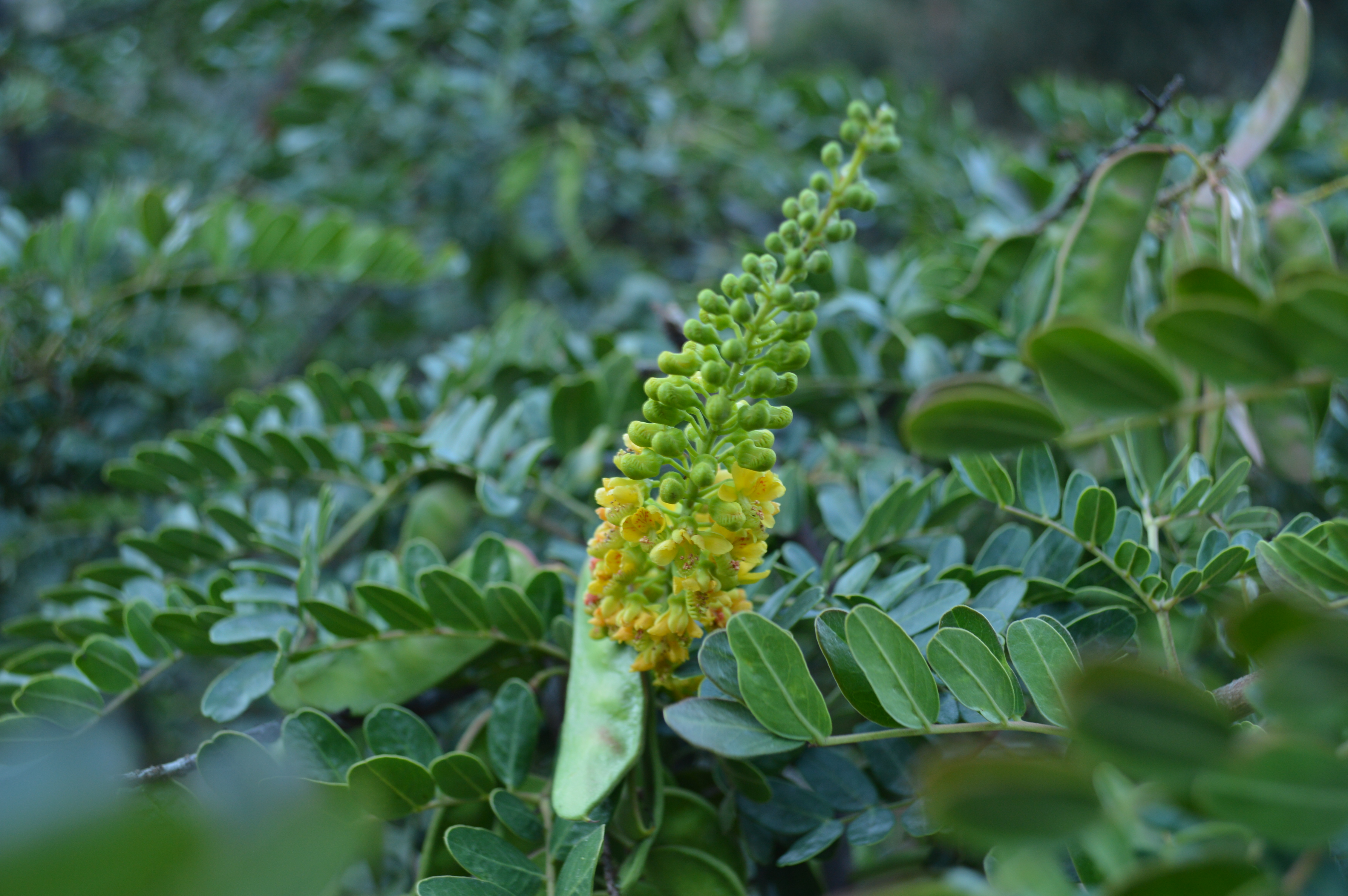 Flor y hojas de Tara (Caesalpinia spinosa) en Rahuapampa, Áncash - Perú.